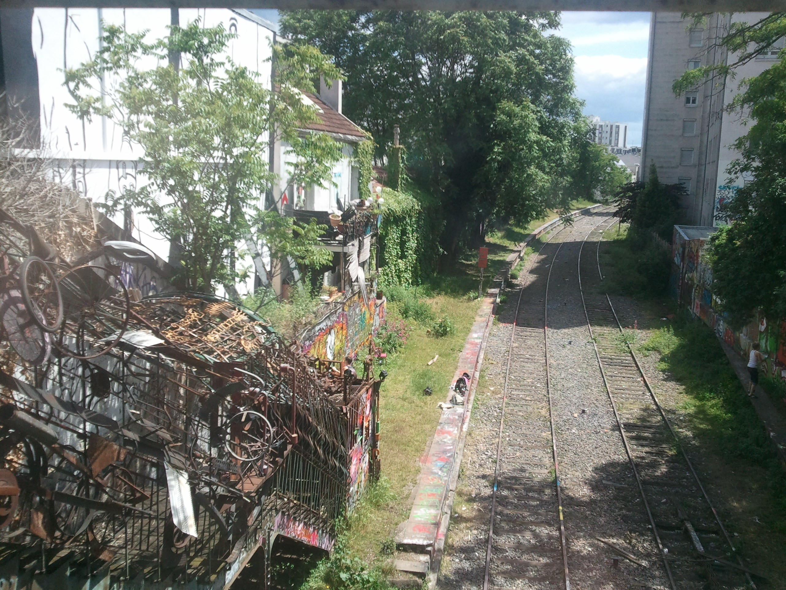 Plate-forme et accès aux quais décorés de l'ancienne station Charonne-Ceinture. Le site est aujourd'hui une salle de spectacles, La Flèche d'Or